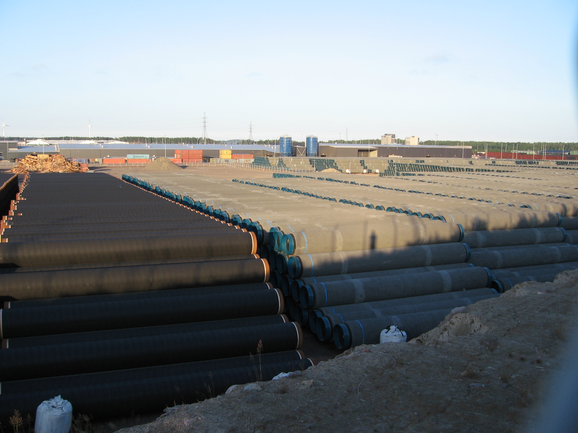 Nord Stream -kaasuputkilinjan putkia varastoituna Kotkassa Mussalon satama-alueella.